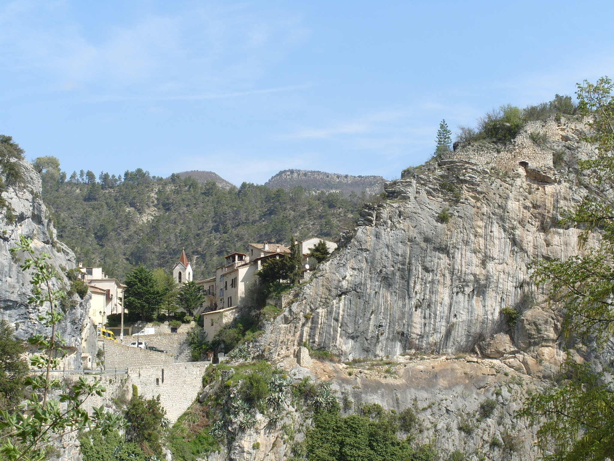 Entrée (Sud) du village de Cuébris (Alpes Maritimes) ; le col formé à gauche du Mont Long et à droite du piton rocher gardant les traces d'anciennes fortifications. La roche présente des affleurements du Crétacé.